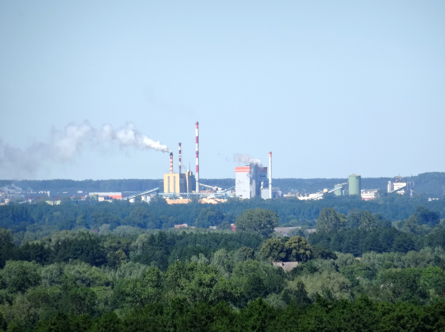 Mondi Świecie S.A., ul. Bydgoska 1 Świecie. Widok z grodziska Talerzyk